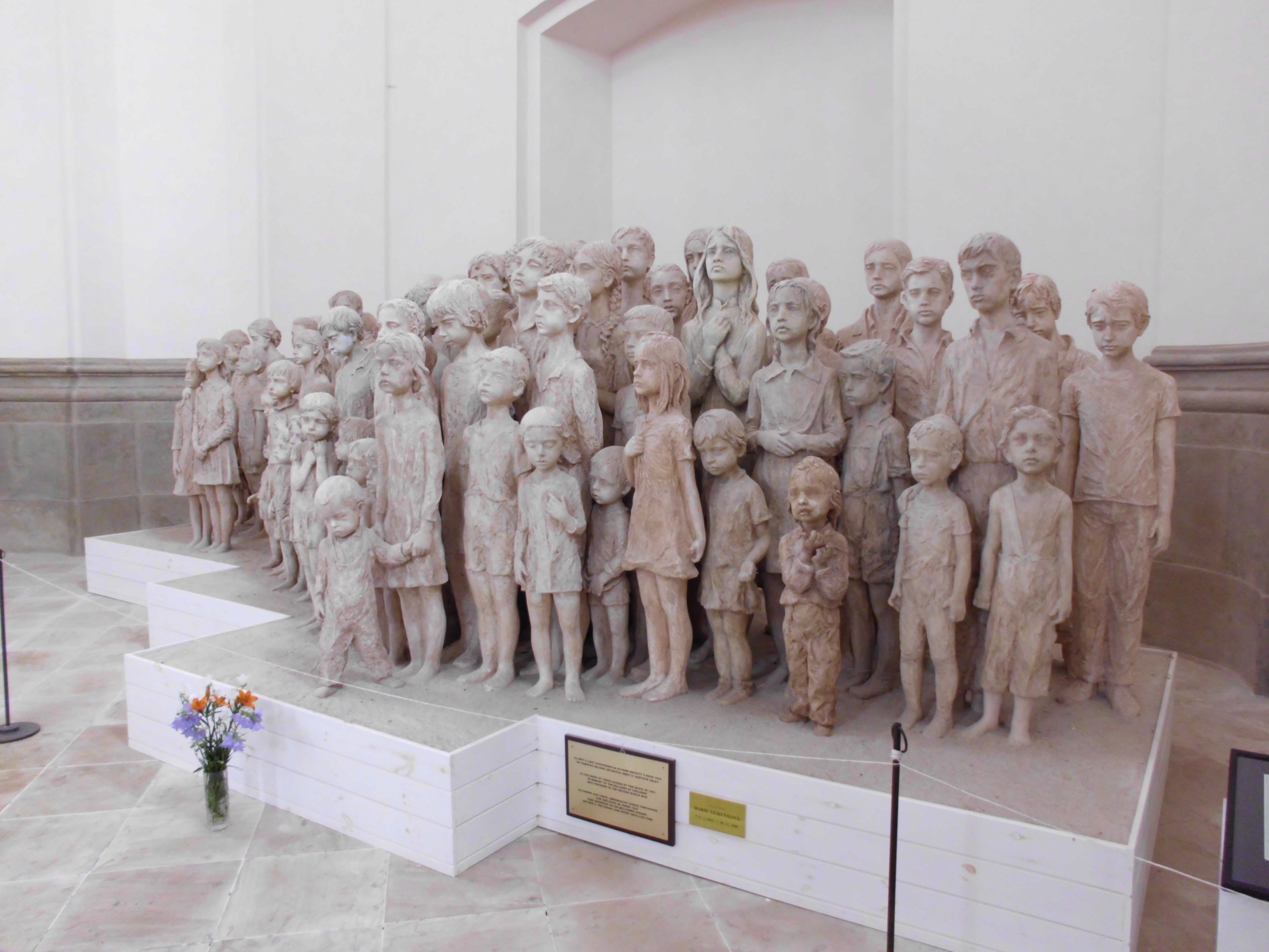 Sádrový model sousoší lidických dětí vystavený v boční kapli kostela Zvěstování Panny Marie, Mariánský Týnec 1, Mariánský Týnec